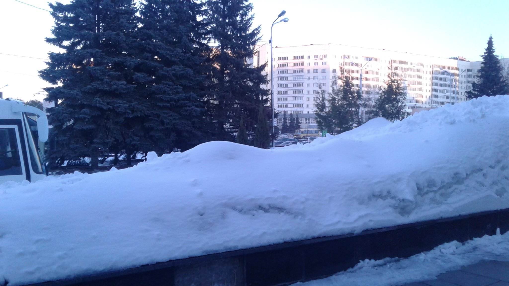 Проспект Октября, стоянка на месте закопанного фонтана